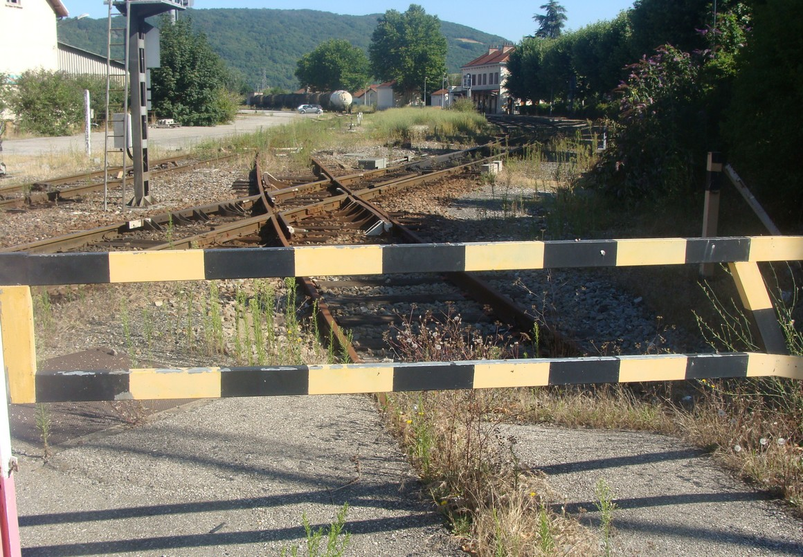 A la sortie sud de la gare de Jarrie-Vizille, l'ancienne amorce de la voie ferrée de Jarrie à Vizille et au-delà vers Bourg-d'Oisans, aujourd'hui abandonnée, croise la voie se dirigeant vers Vif et la Croix-Haute. Au fond à droite, le bâtiment de la gare.